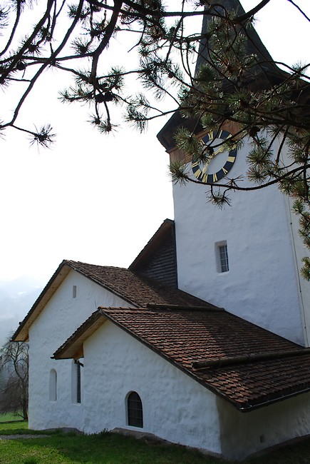 Vue extérieure de l'église d'Oberwil im Simmental (canton de Berne, CH)